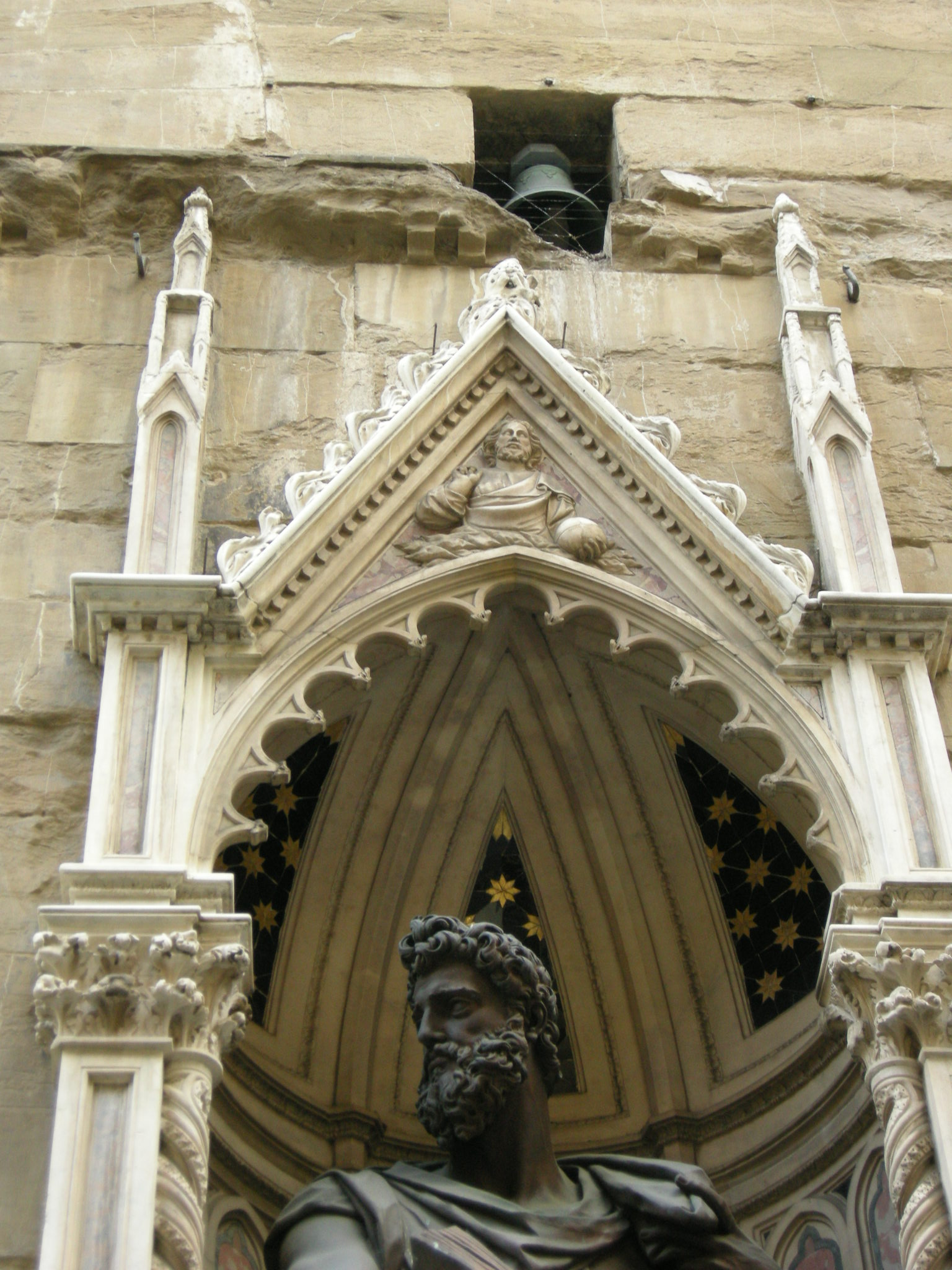 Orsanmichele, tabernacolo dell'arte dei giudici e notai